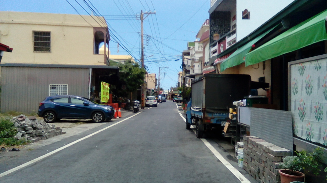 位於枋山鄉中段 鄉公所所在地 唯商業機能不及加祿與楓港發達